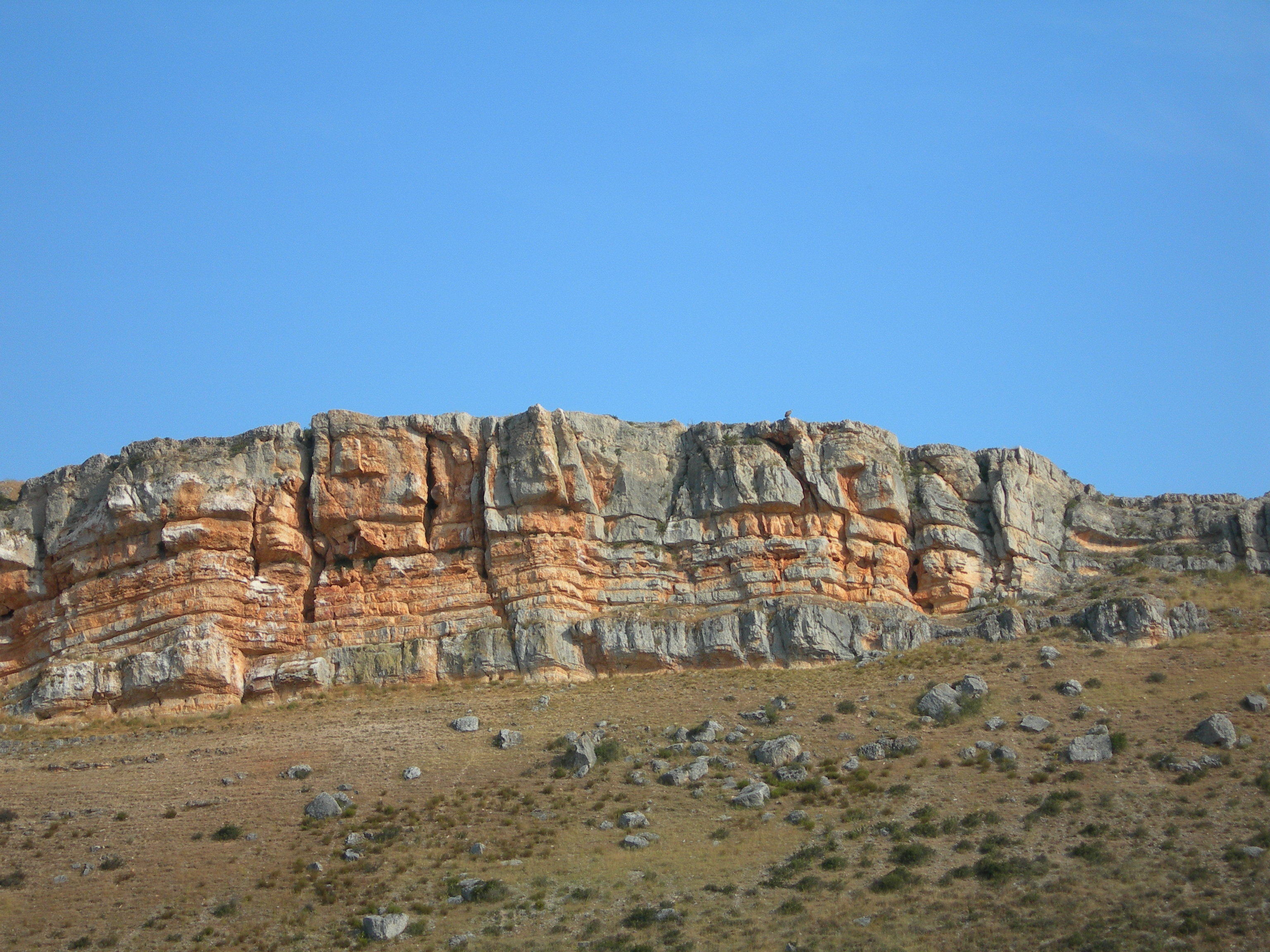 Riscos del Hoyo